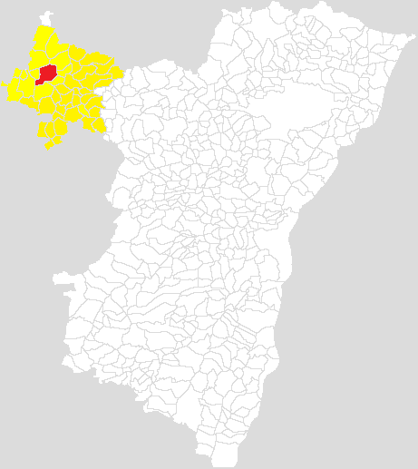 Communauté de communes de l'Alsace Bossue